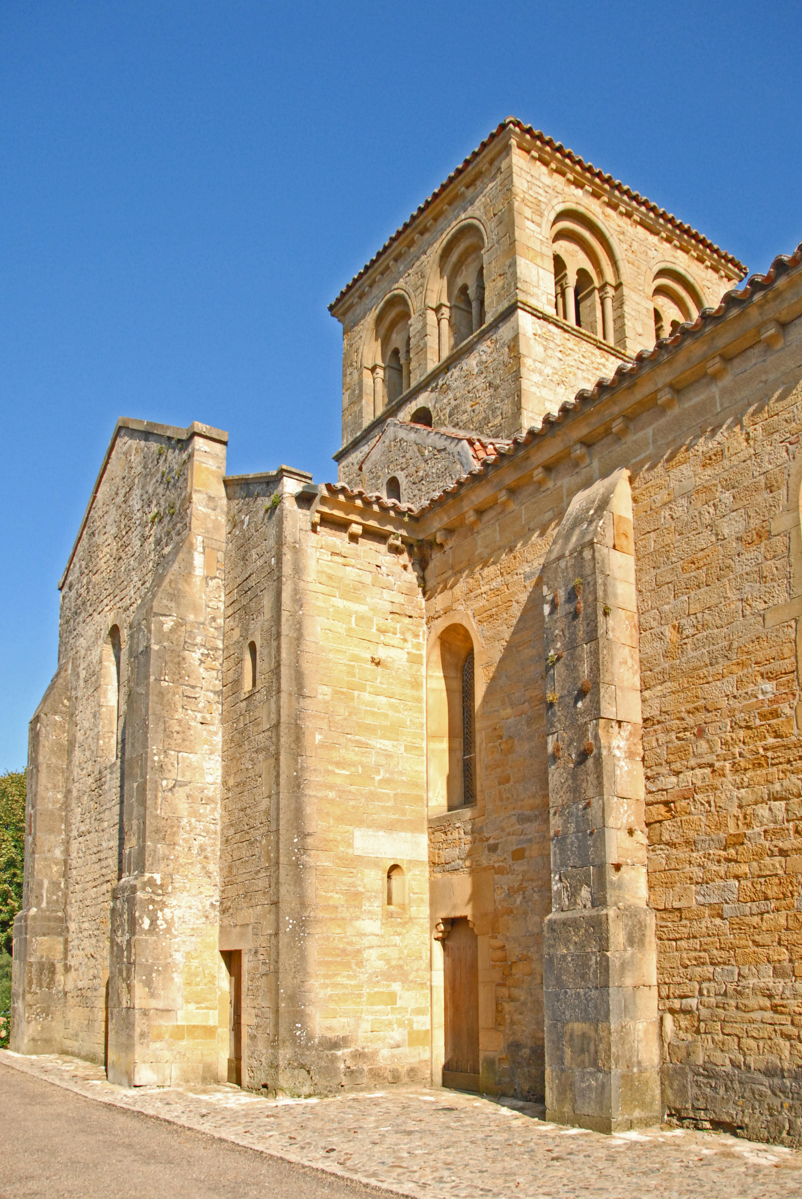 St-André d'Iguerande, Querhaus und Turm von Norden